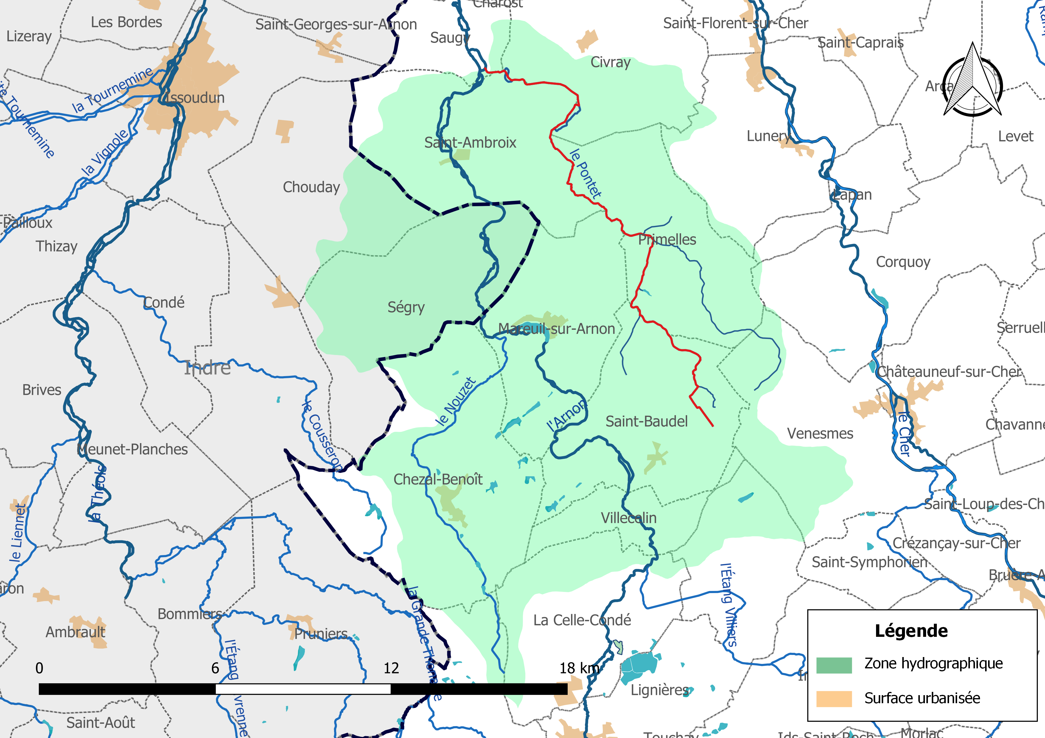 Carte du cours d'eau « le Pontet » (France) et de la zone hydrographique dans laquelle il s'insère.